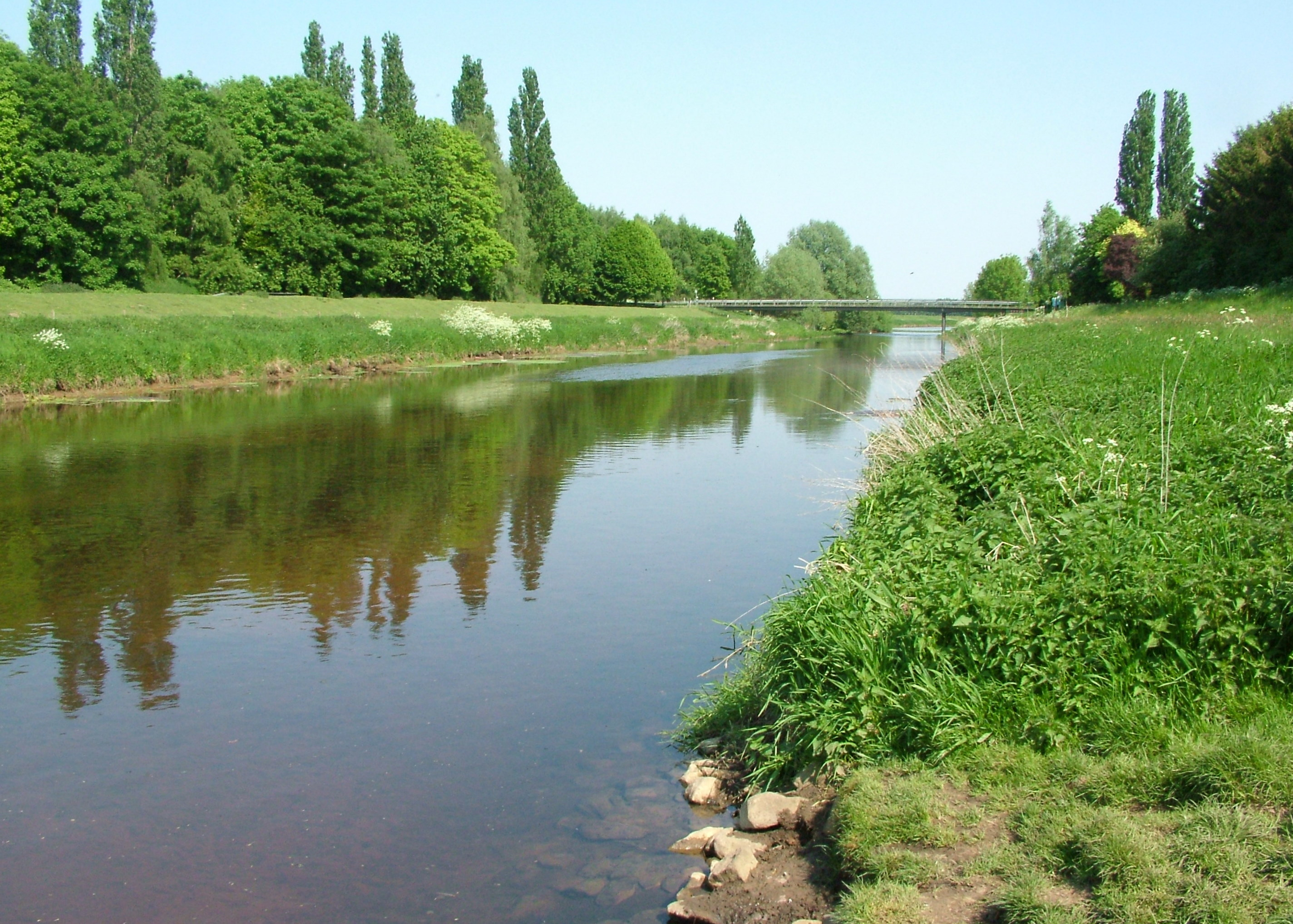 Bocolter Aa (Aa-Strang) zwischen TOP Brüggenhütte und Dinxperlo